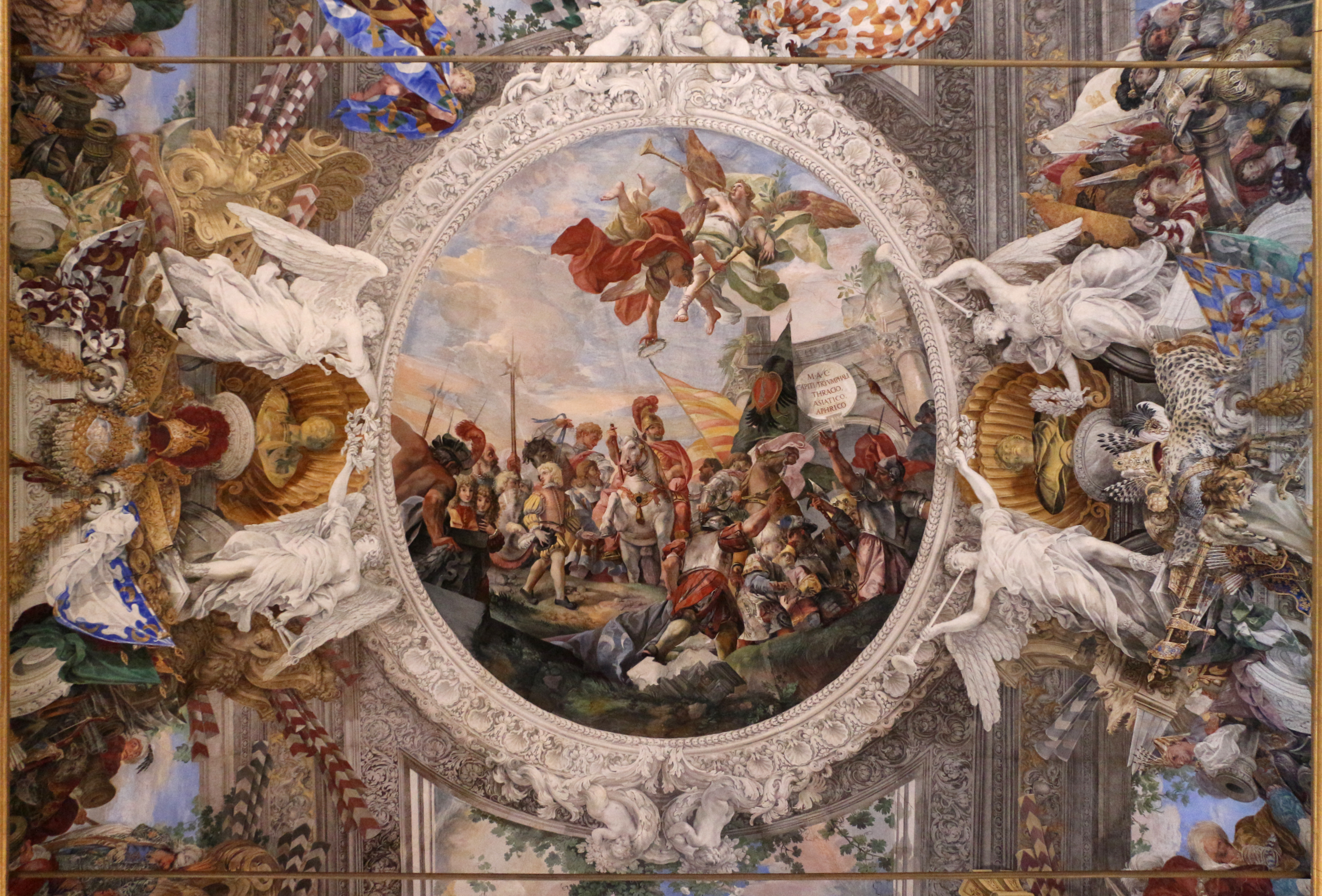 Giovanni Coli e Filippo Gherardi, storie della battaglia di lepanto, 1675-78, 01.JPG